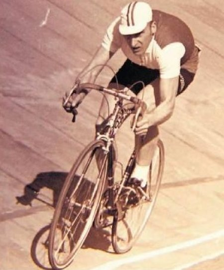 Jan Magiera na zawodach